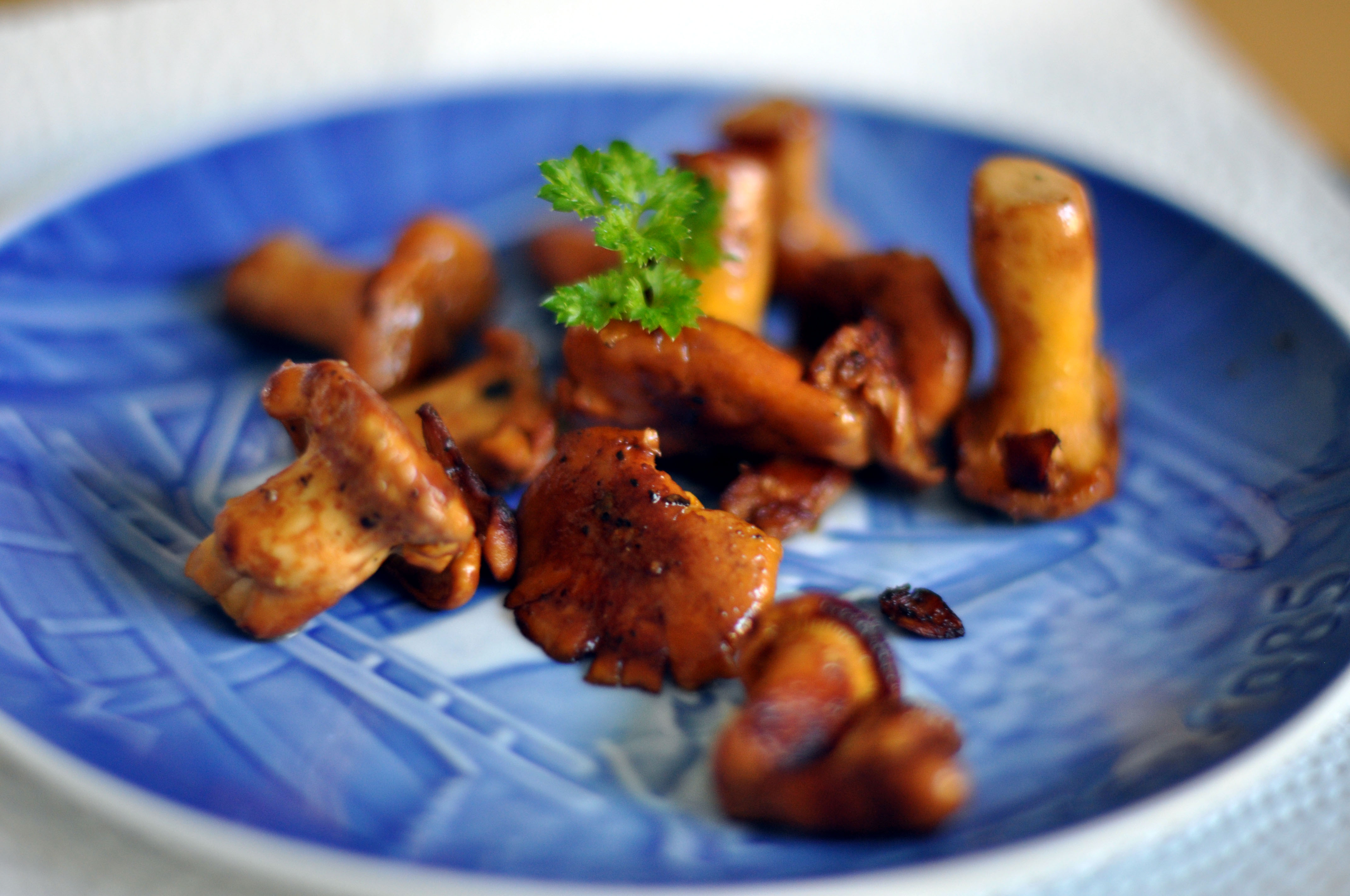 Smørstegte kantareller (Smørstegte chanterelles)